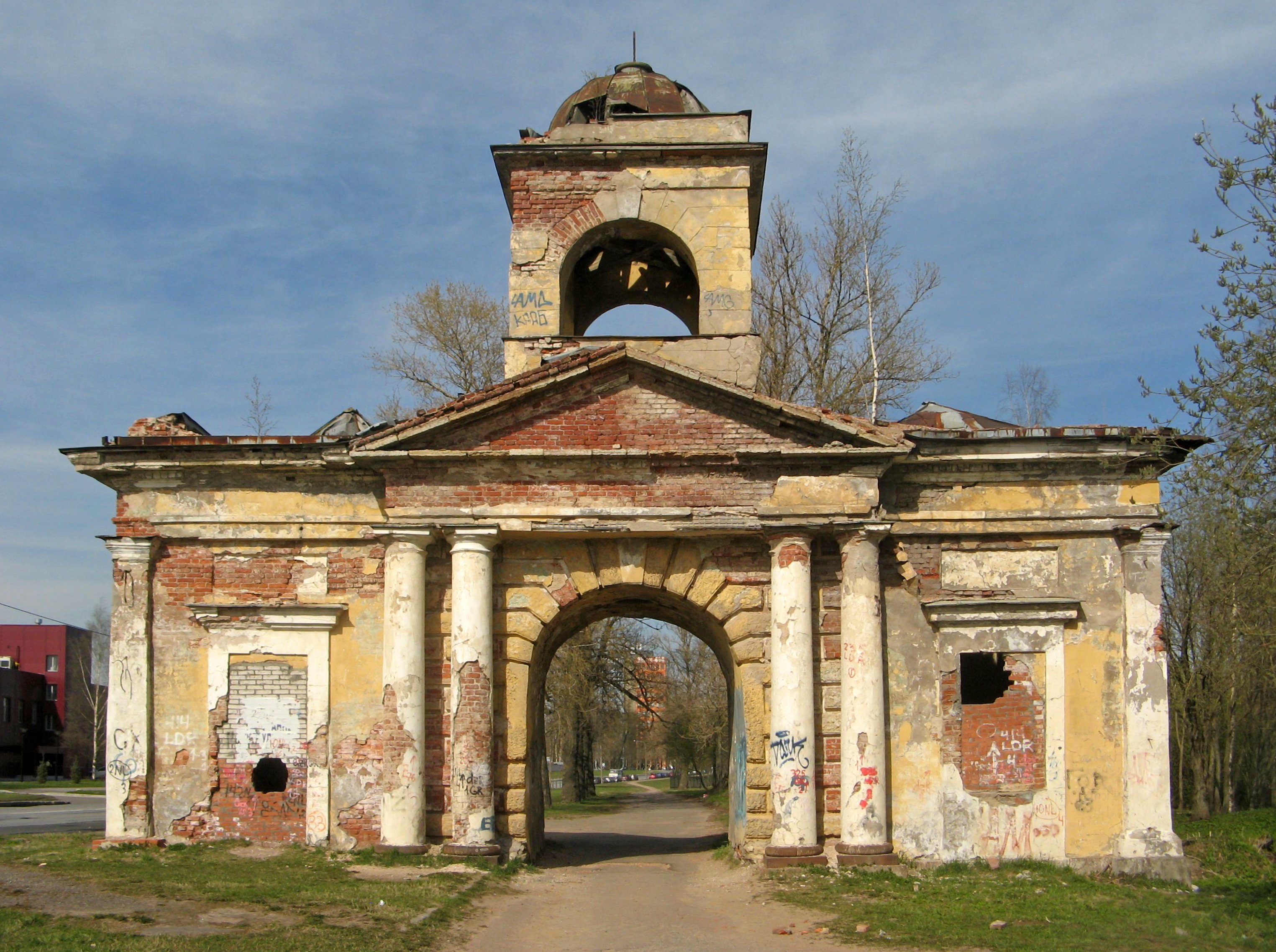 Александровские ворота: улица Химиков, 20 сооружение 1 литера А, Красногвардейский район, Санкт-Петербург